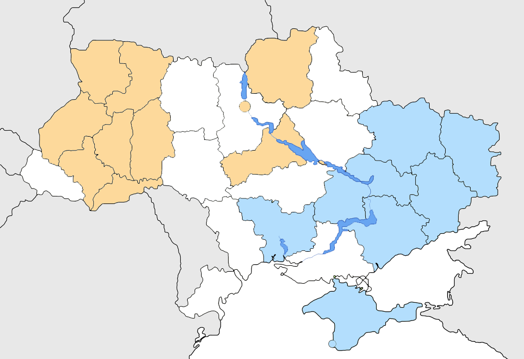 Під час розгляду справи «Ющенко проти ЦВК» (2004) сторона Ющенка обґрунтовувала наявність фальсифікацій у Донецькій, Луганській, Запорізькій, Харківській, Дніпропетровській, Миколаївській областях, в Автономній Республіці Крим і Севастополі (синій колір). Сторона Януковича обґрунтовувала наявність фальсифікацій у Волинській, Івано-Франківській, Львівській, Рівненській, Тернопільській, Хмельницькій, Черкаській, Чернівецькій, Чернігівській областях і місті Києві (помаранчевий колір).